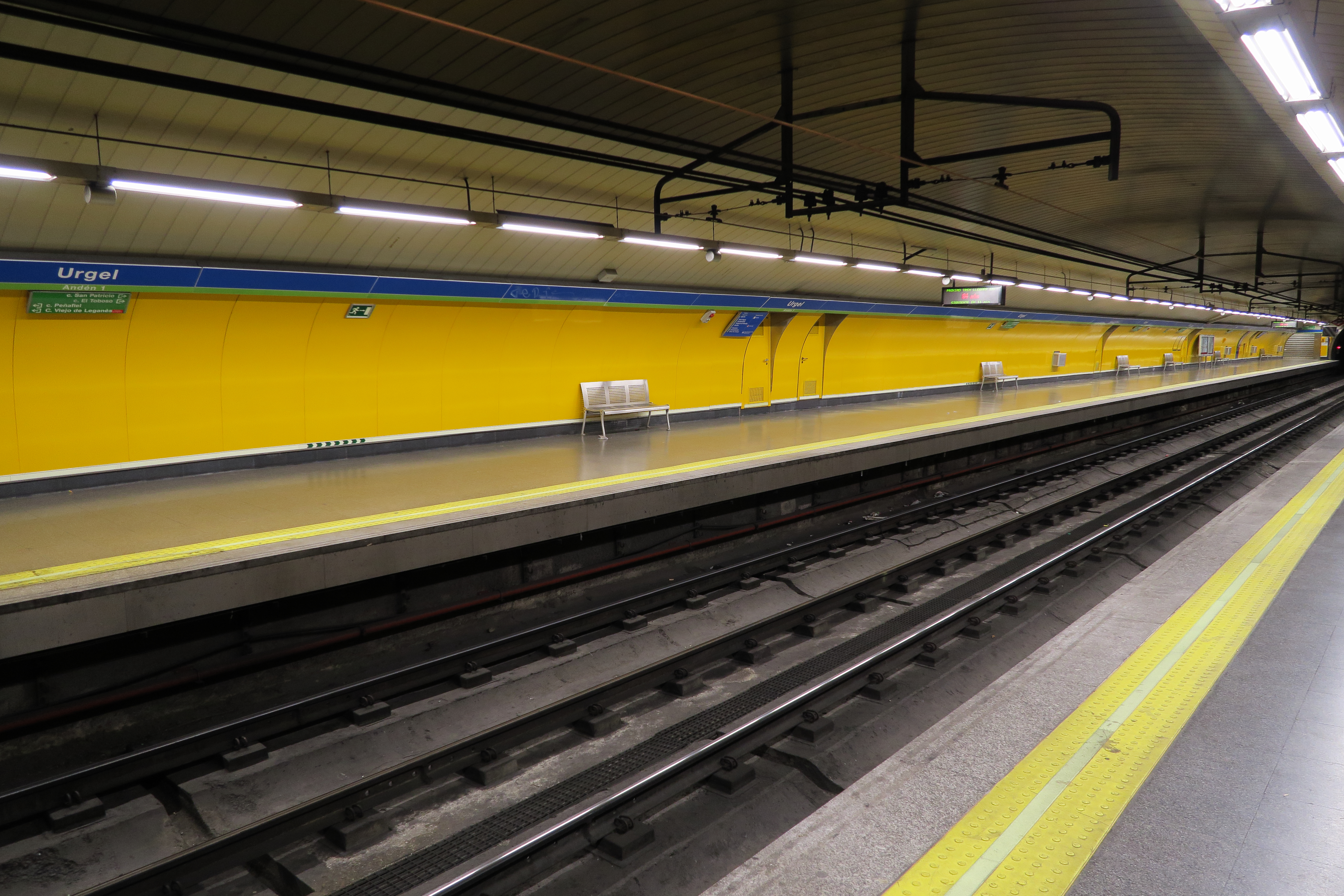 Estación de Urgell, andenes